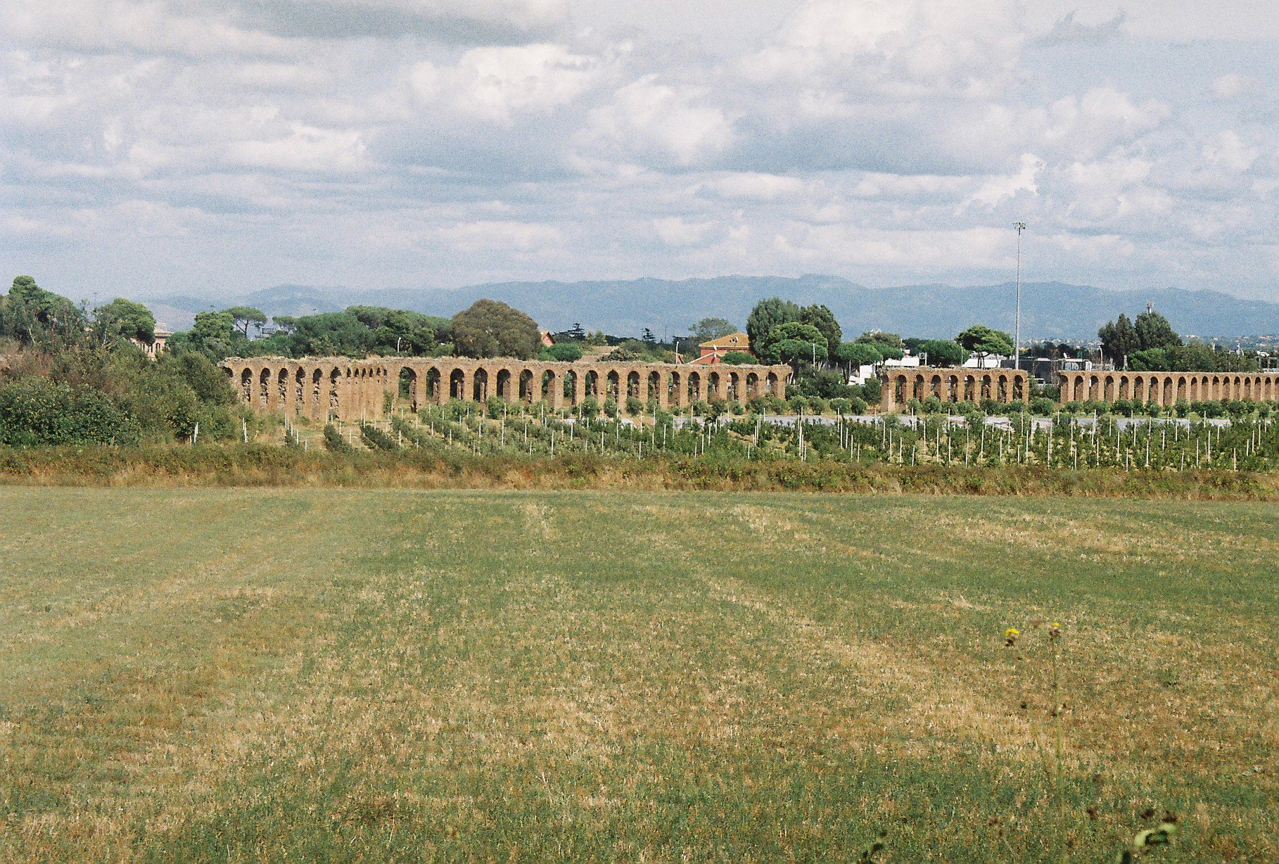 Aqua Claudia aquaeduct near Rome